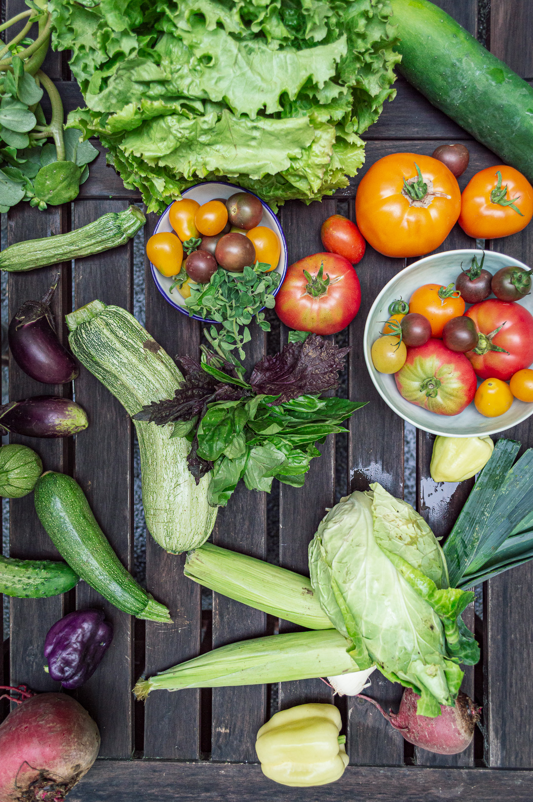 Inhalt eines Gemüse-Kisterls im August